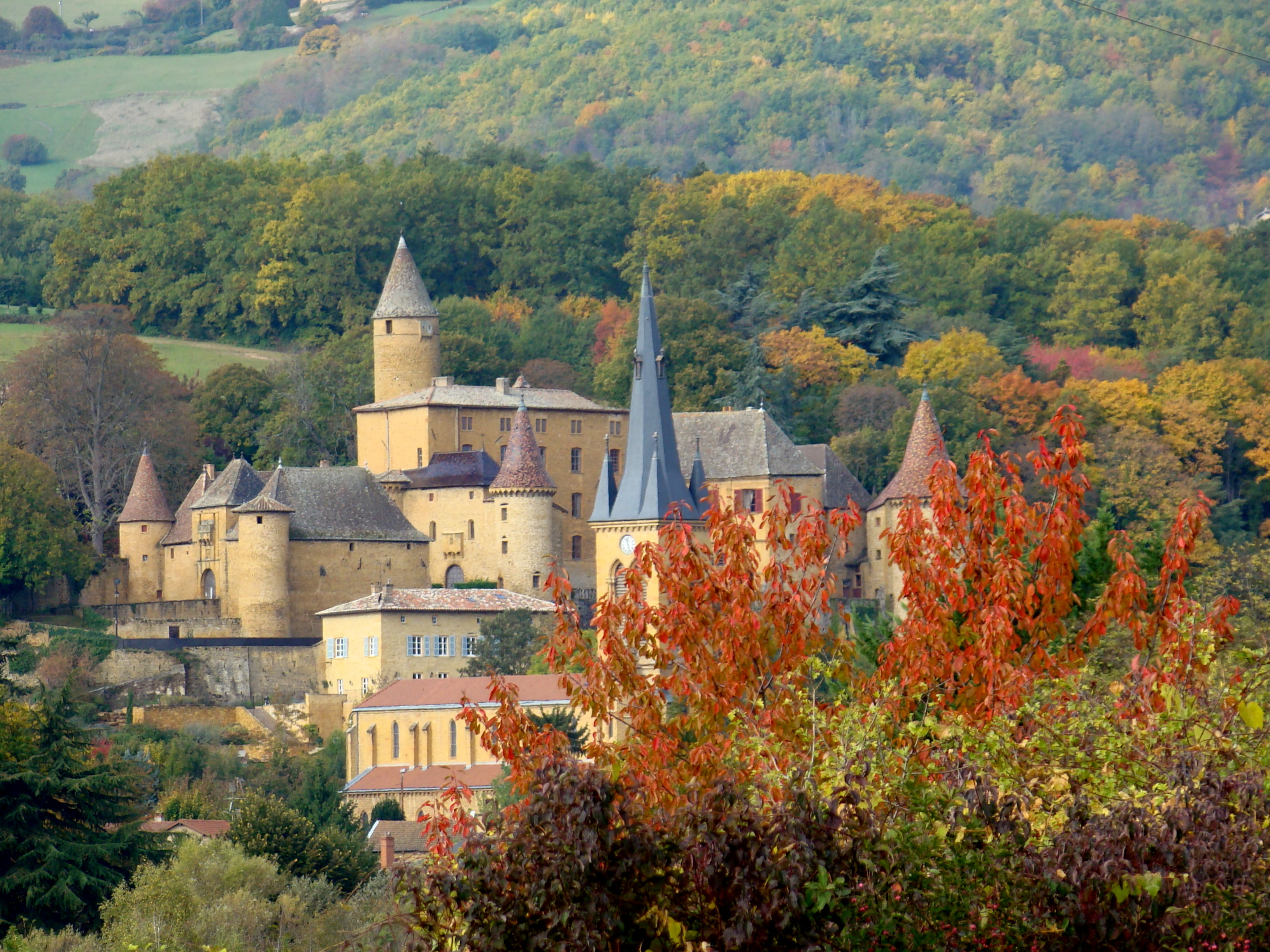 45° 57' 43.87" N 4° 38' 36.31" E